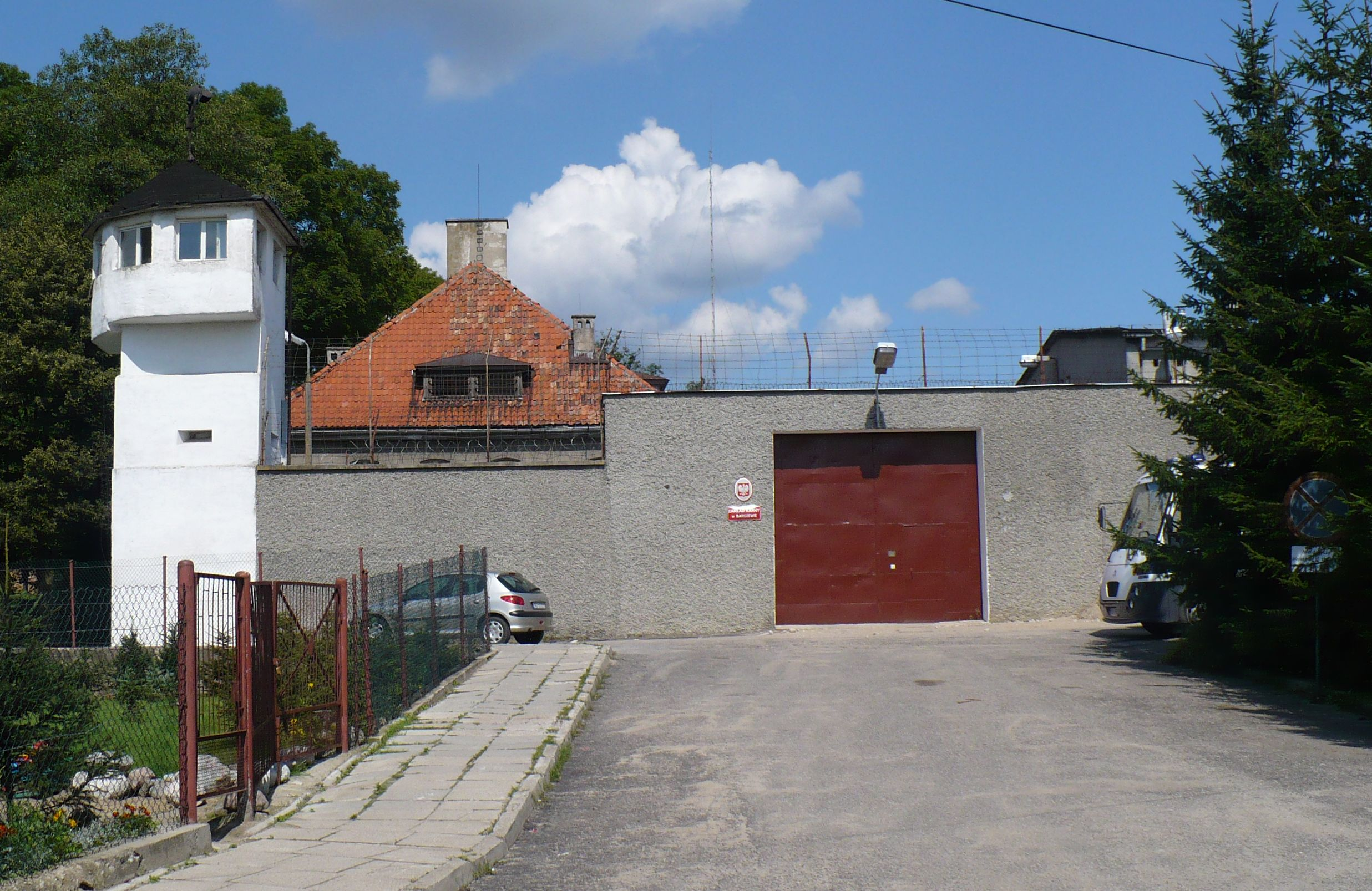 Zakład Karny Barczewo brama wjazdowa